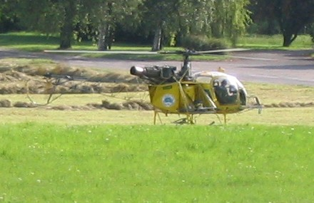 Hélicoptère Lama